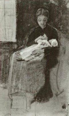 Pintura estancia en La Haya